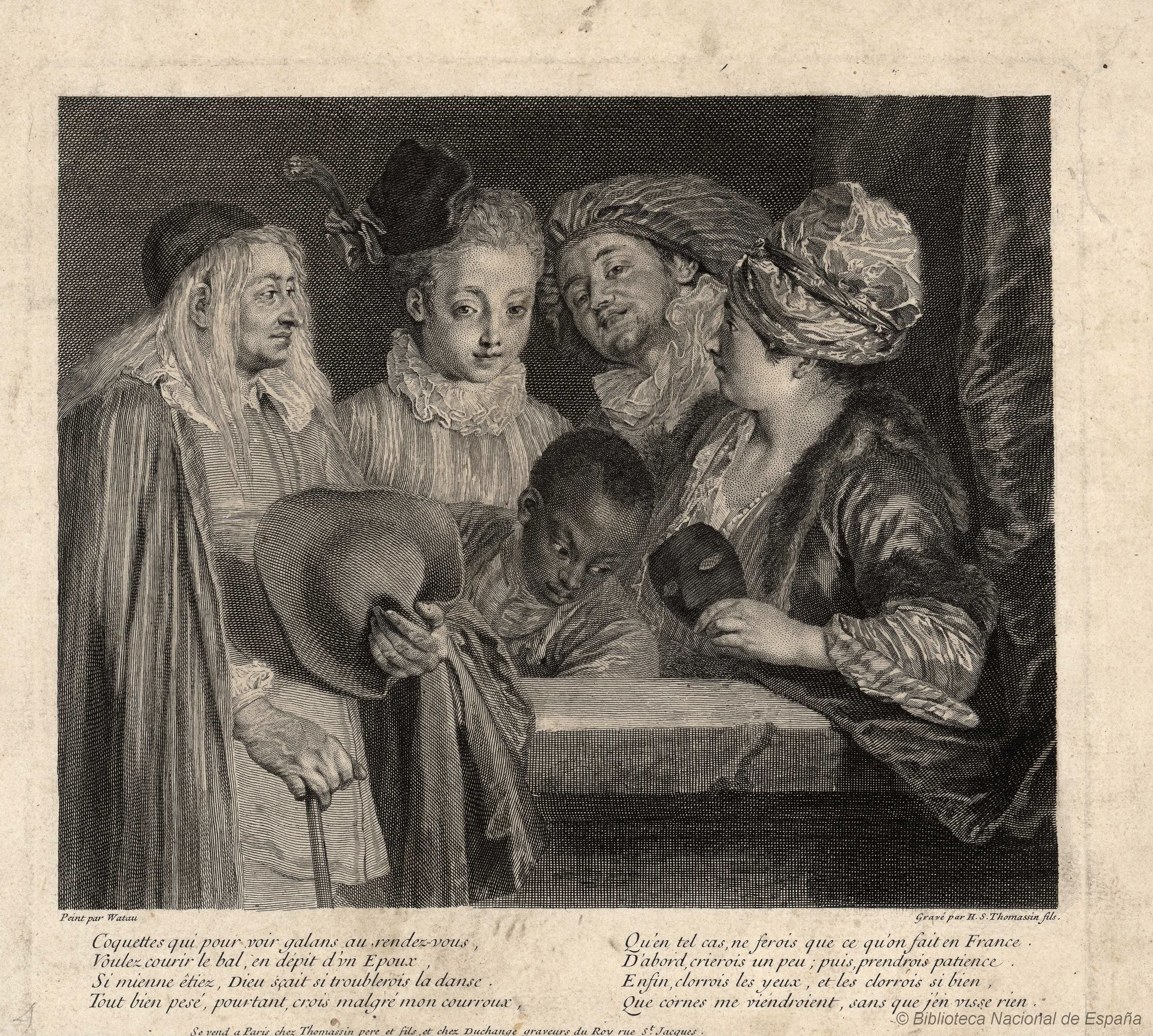 Les coquettes, grabado de Henri Simon Thomasin por pintura de Antoine Watteau. Aguafuerte y buril firmado: Peint par Watau; Gravé par H. S. Thomassin fils. Biblioteca Nacional de España.